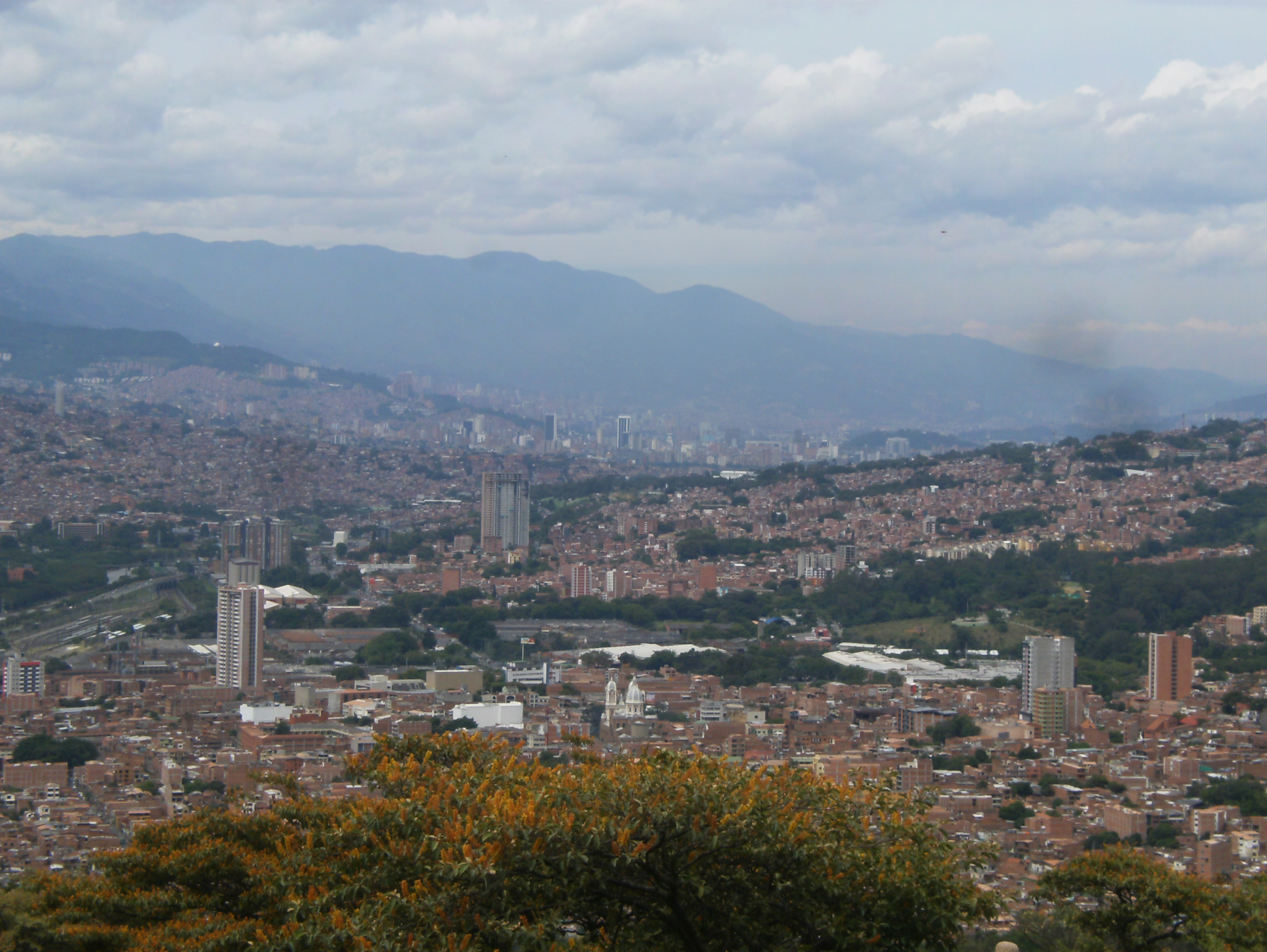 Centro de Medellín y el Aburrá Sur vistos desde el Cerro Quitasol en Bello